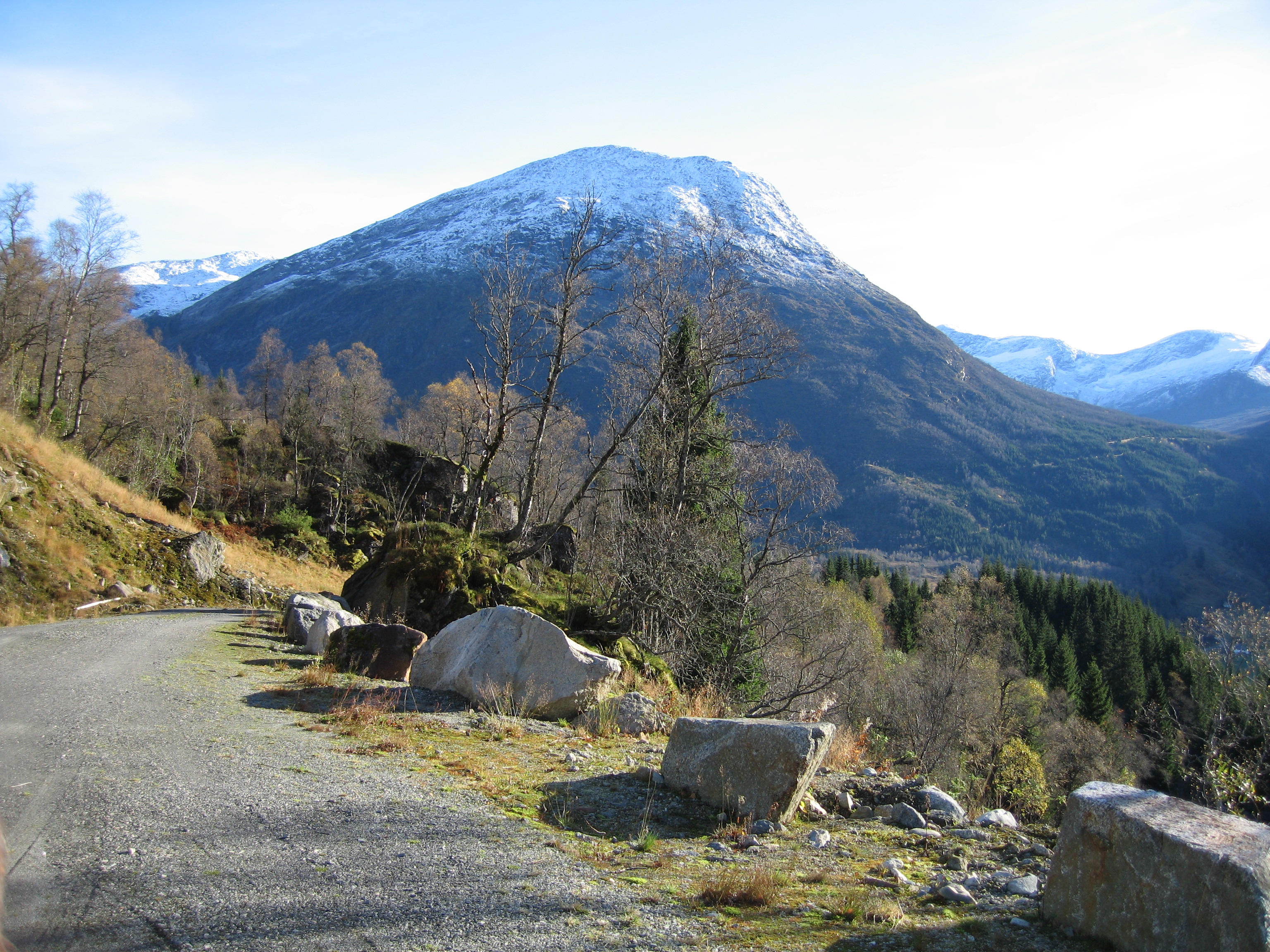 Looking at Befring in Stardalen, Jølster